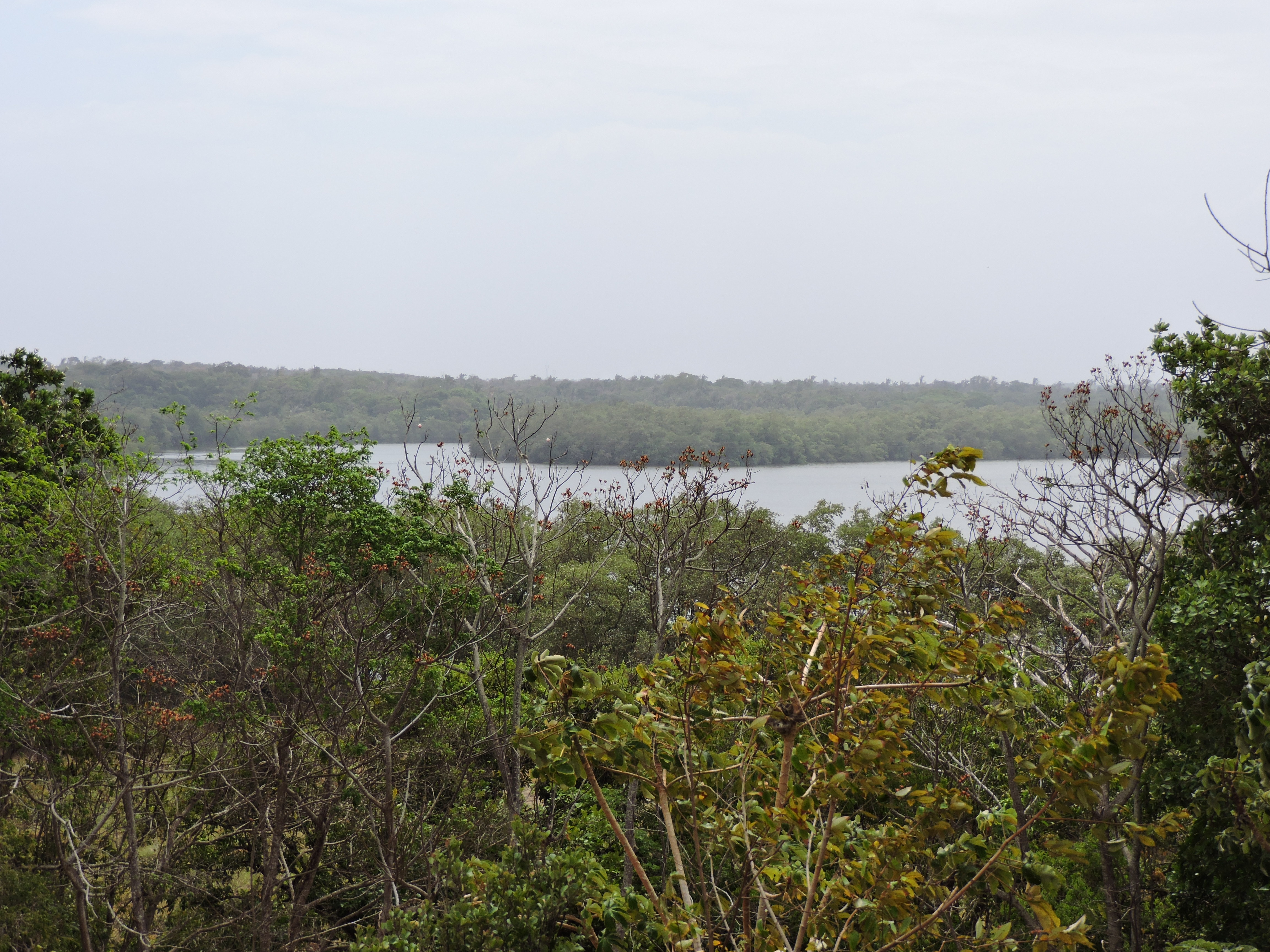 fotos tiradas no bacanga